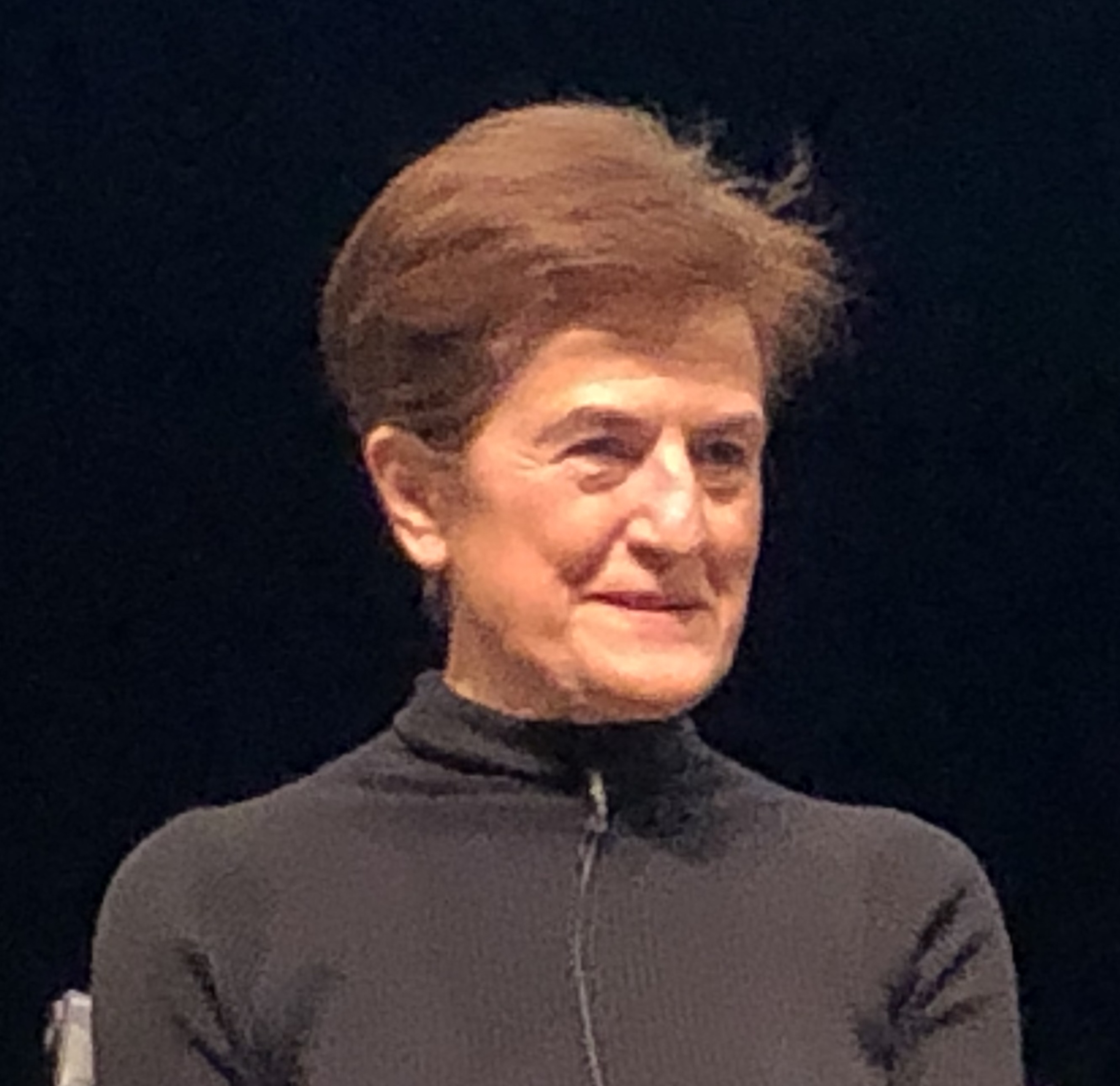 II Festival de Filosofía de Málaga